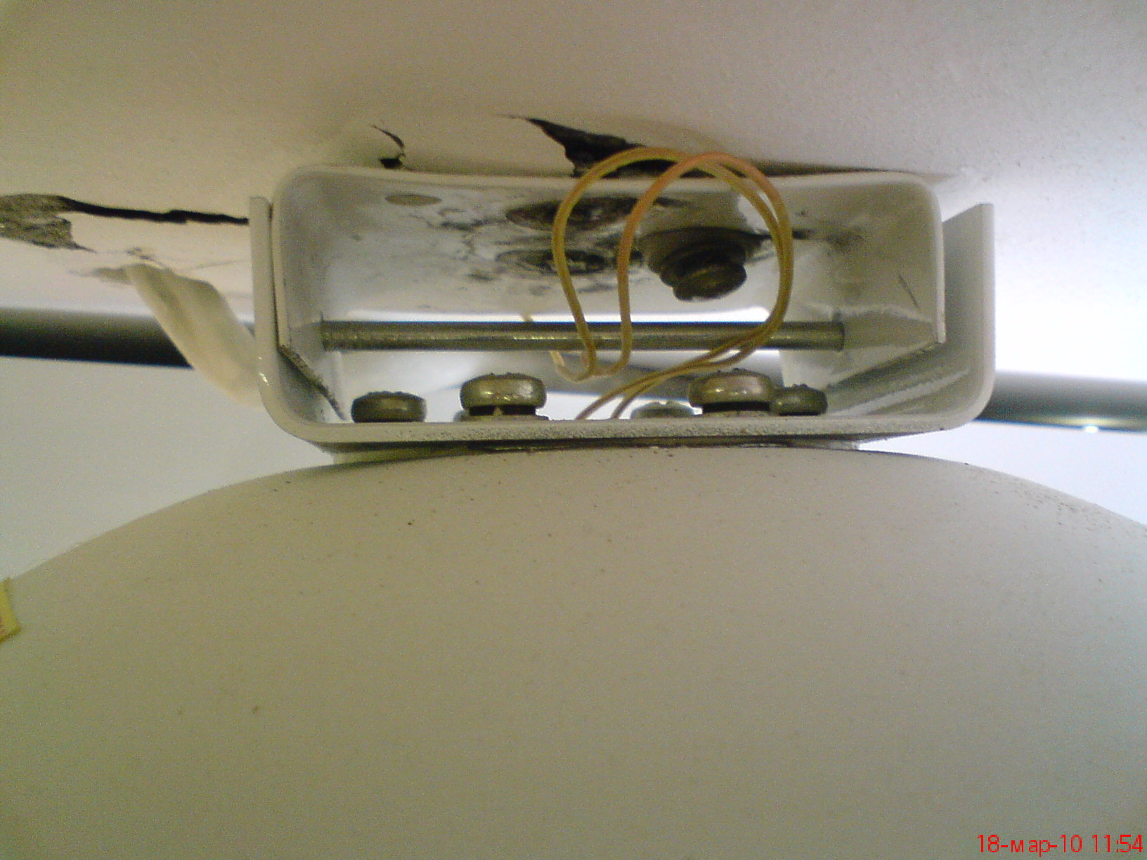 Крепление, огнепроводящий шнур МПП Буран-2.5